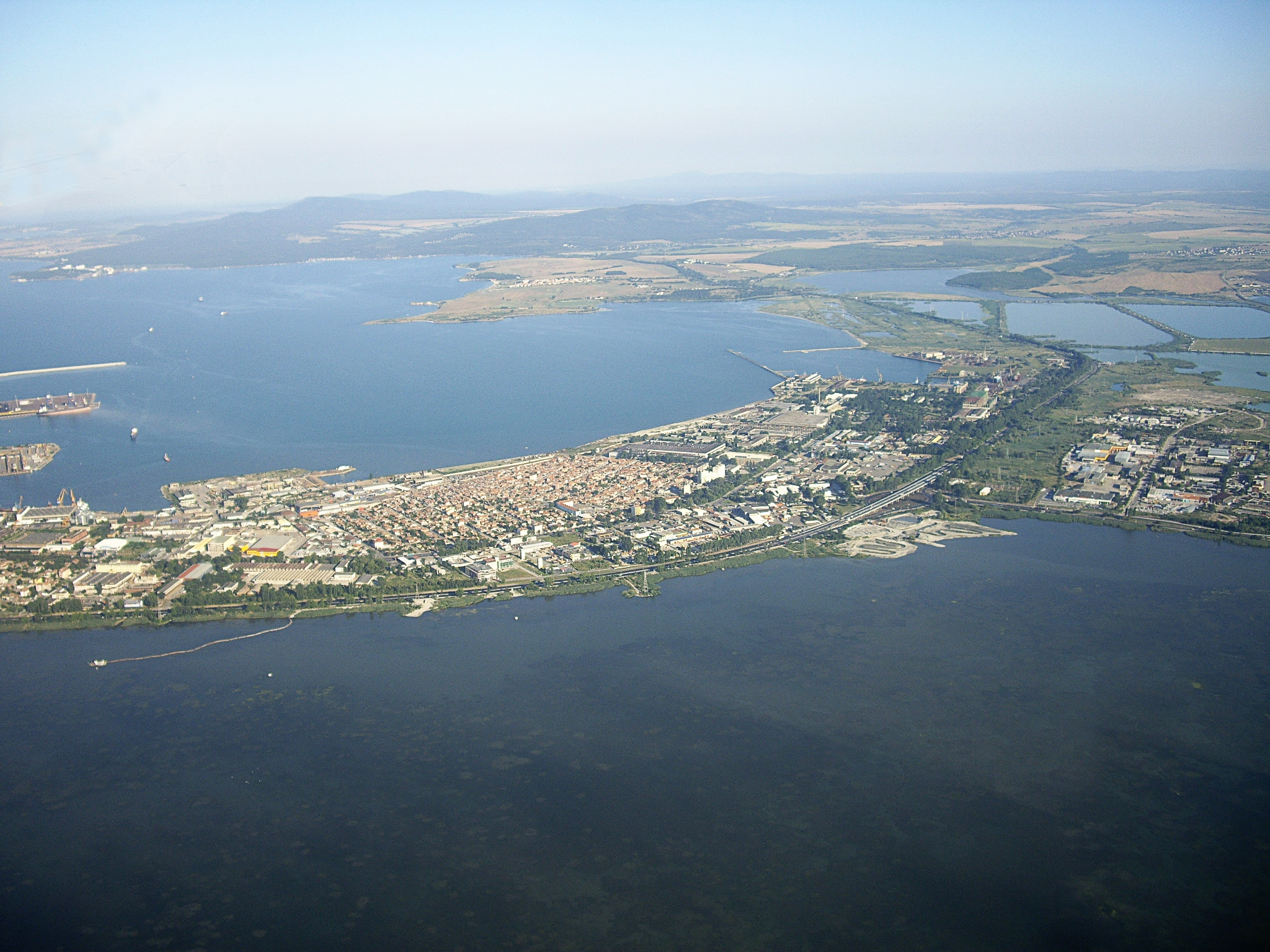 Бургас, България: На преден план Бургаското езеро, пясъчната коса Кумлука погледната от запад с кварталите Победа и Акациите, както и индустриалната зона „Юг“ (промишлените зони Победа и ЮГ) с част от пристанищния комплекс. На заден план е Черно море, защитените зони Пода и Узеунгерен (част от комплекс Мандра-Пода) както и прилежащите към Странджа планина Ала тепе и Медни рид с върха Бакърлък (362 m).